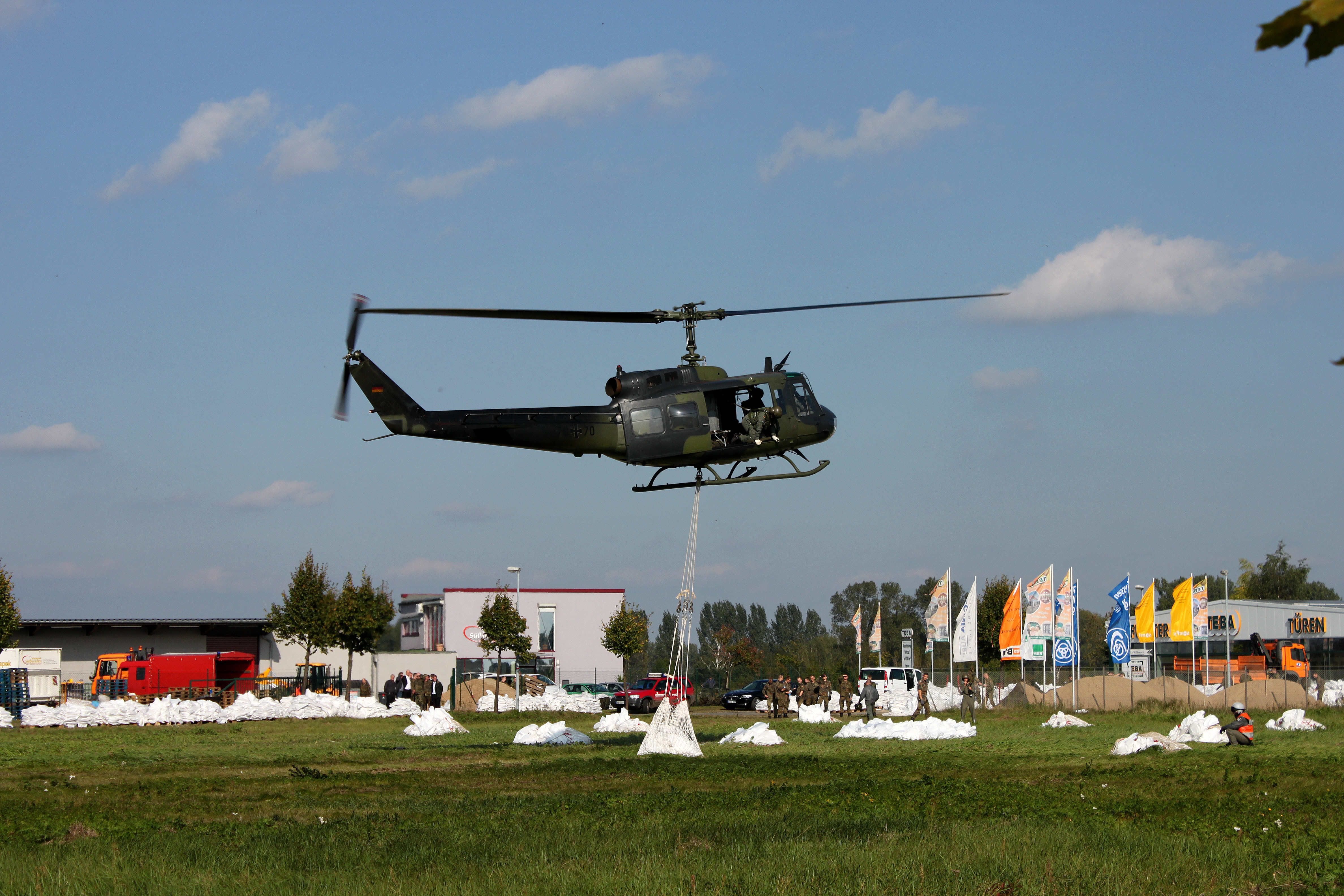 Hochwasser der Schwarzen Elster in Bad Liebenwerda.